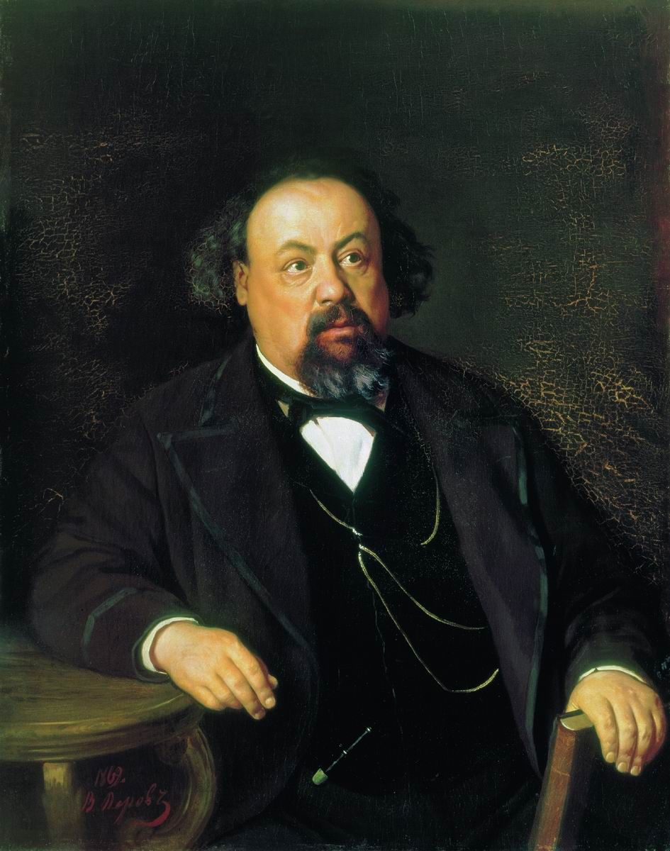 Портрет писателя А.Ф. Писемского